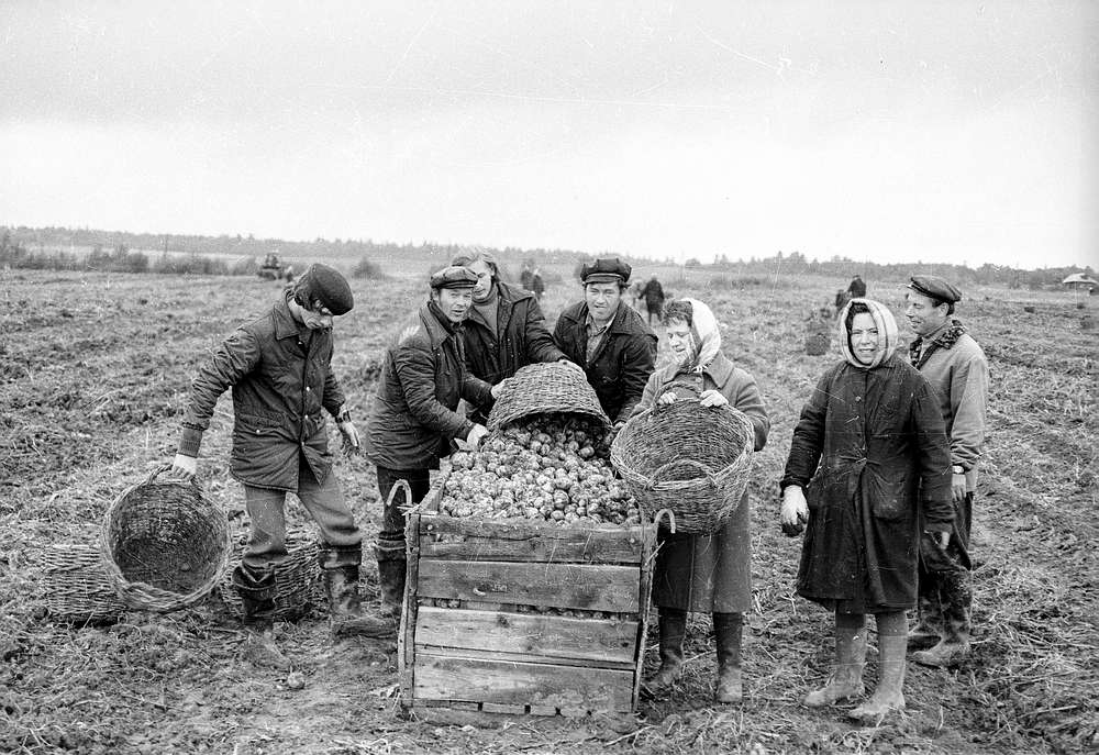 Переславские работники мебельного цеха ярославского объединения «Красный Октябрь» оказывают шефскую помощь совхозу «Глебовский» на уборке картофеля. Село Глебовское, Переславский район. (Переславский музей-заповедник, отдел истории советского общества, конверт 1068. По газетному списку номер 38.)